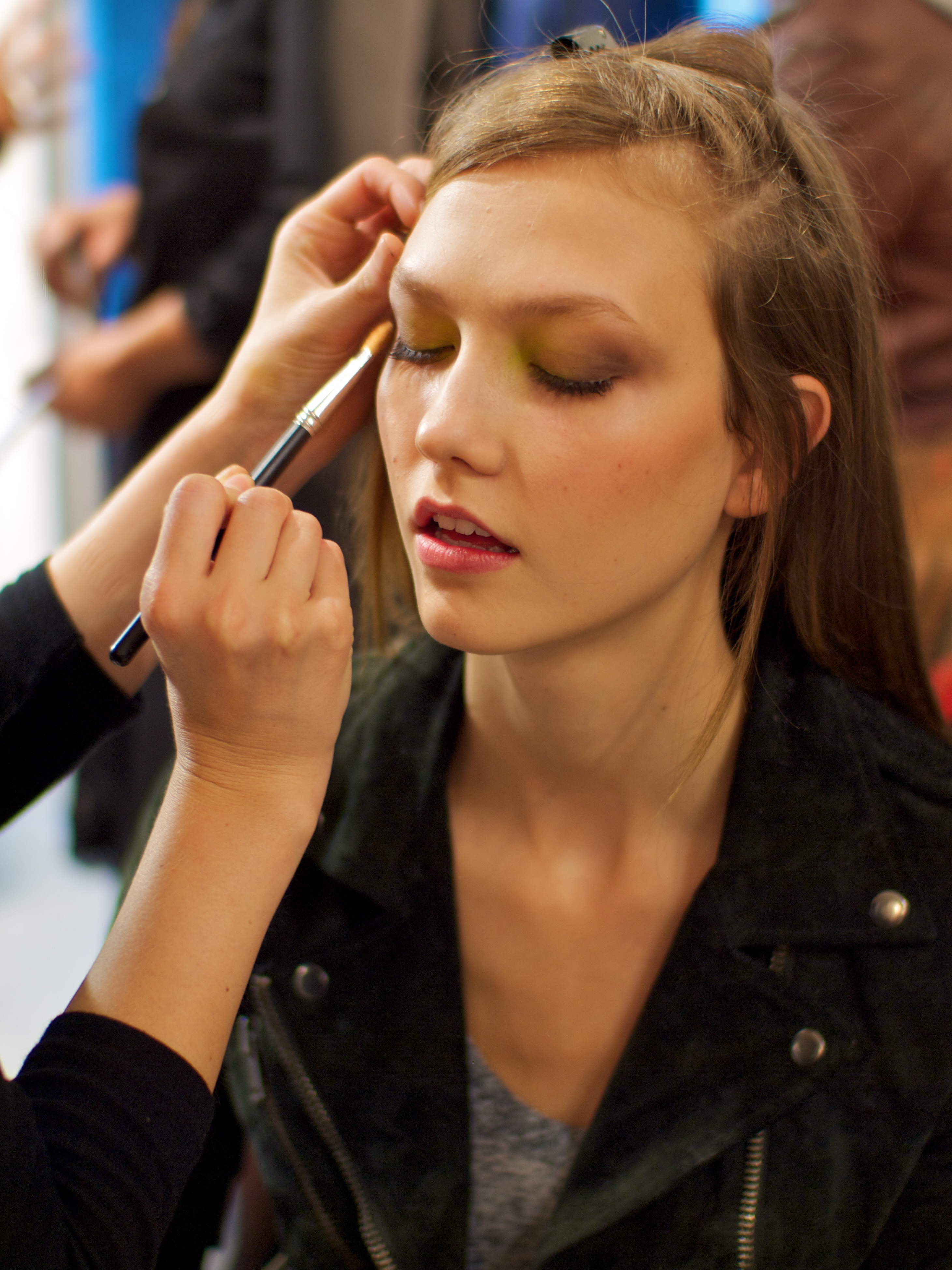 Backstage Elie Saab prêt-à-porter printemps-été 2011